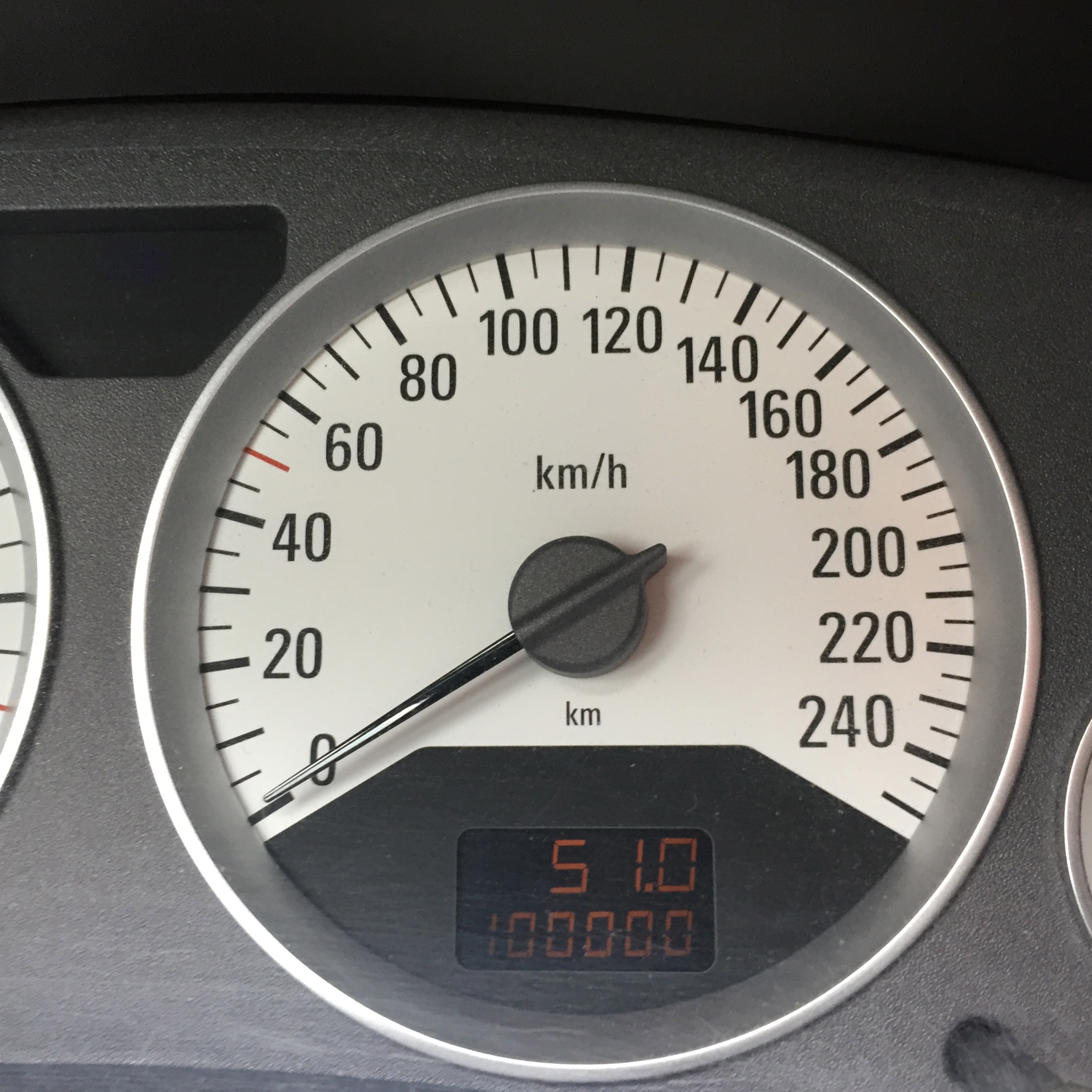 Tachometer mit digitaler km-Standsanzeige